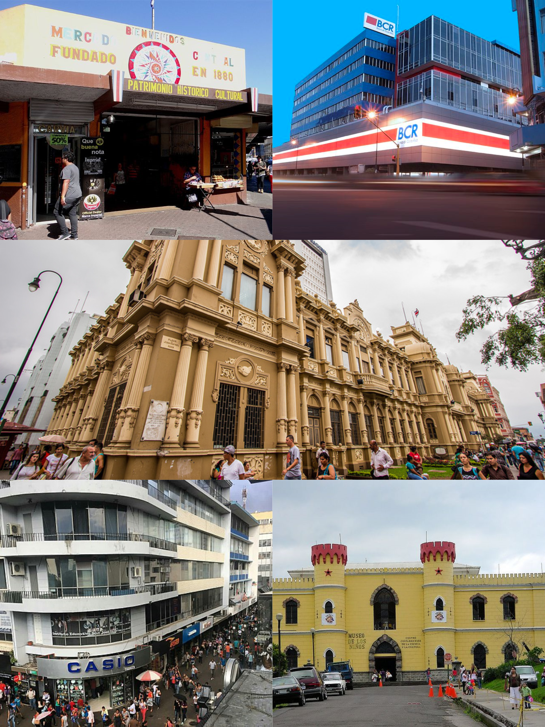 Fotomontaje del distrito de Merced, ciudad de San José.